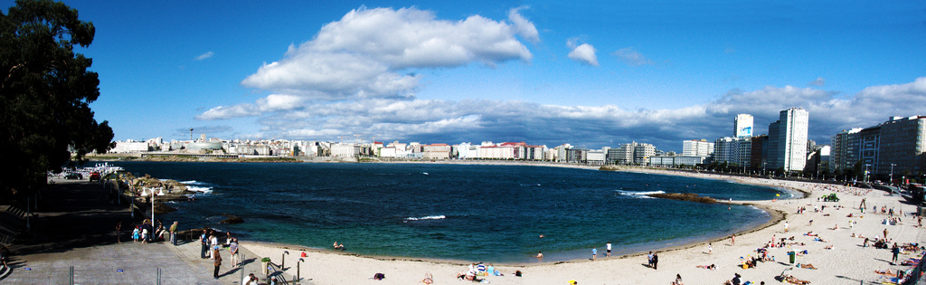 Panorámica desde el paseo marítimo, Rizor, A Coruña.